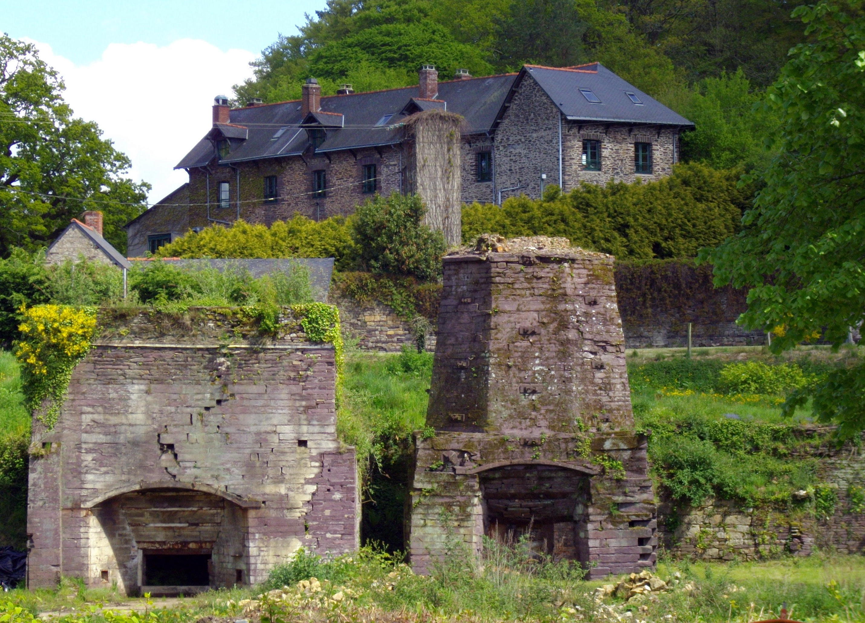 Les hauts fourneaux (en arrière: ancienne cantine des ouvriers devenue un restaurant)